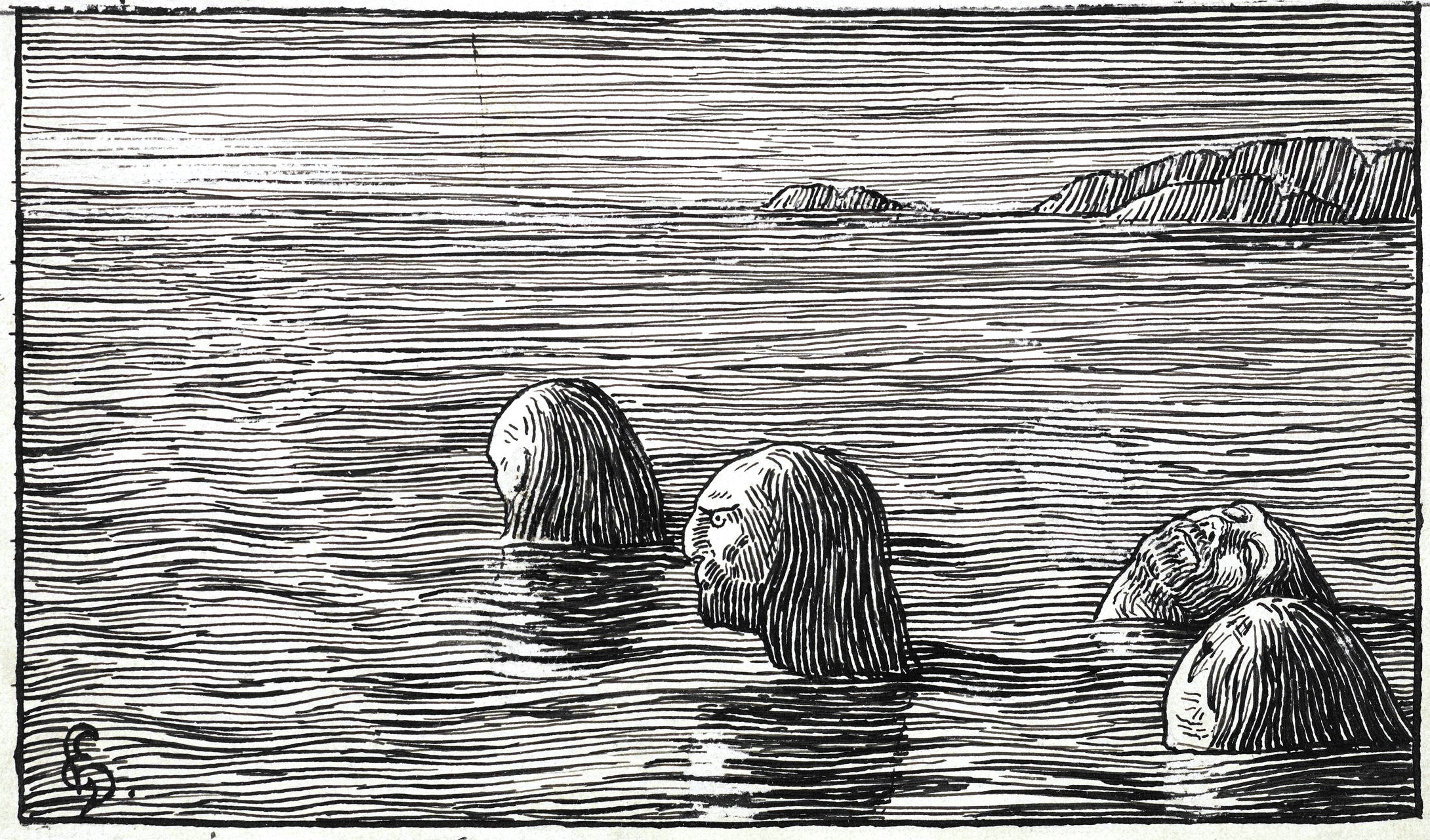 Halfdan Egedius: Illustration for Olav Trygvasons saga. Snorre 1899-edition. «Seidmændene paa Skratteskjær.» nb: «Seidmennene på Skratteskjær.» nn: «Seidmennene på Skratteskjær.»